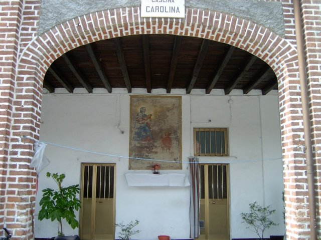 La Cascina Carolina a Castellazzo de' Stampi, frazione di Corbetta (MI) - Italy